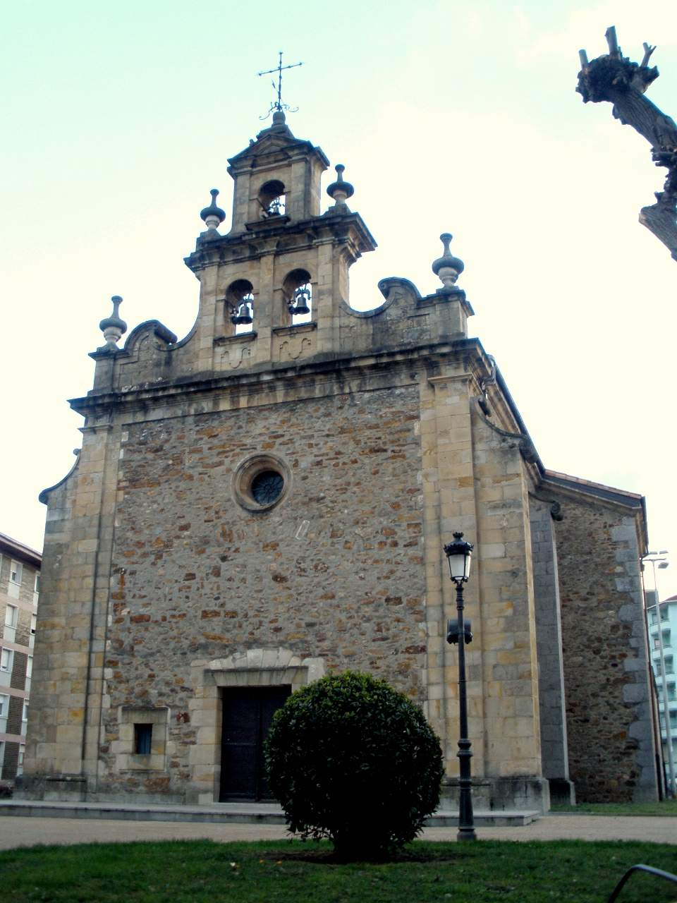 Ermita de Nuestra Señora de Udiarraga (Ugao-Miraballes, Bizkaia)